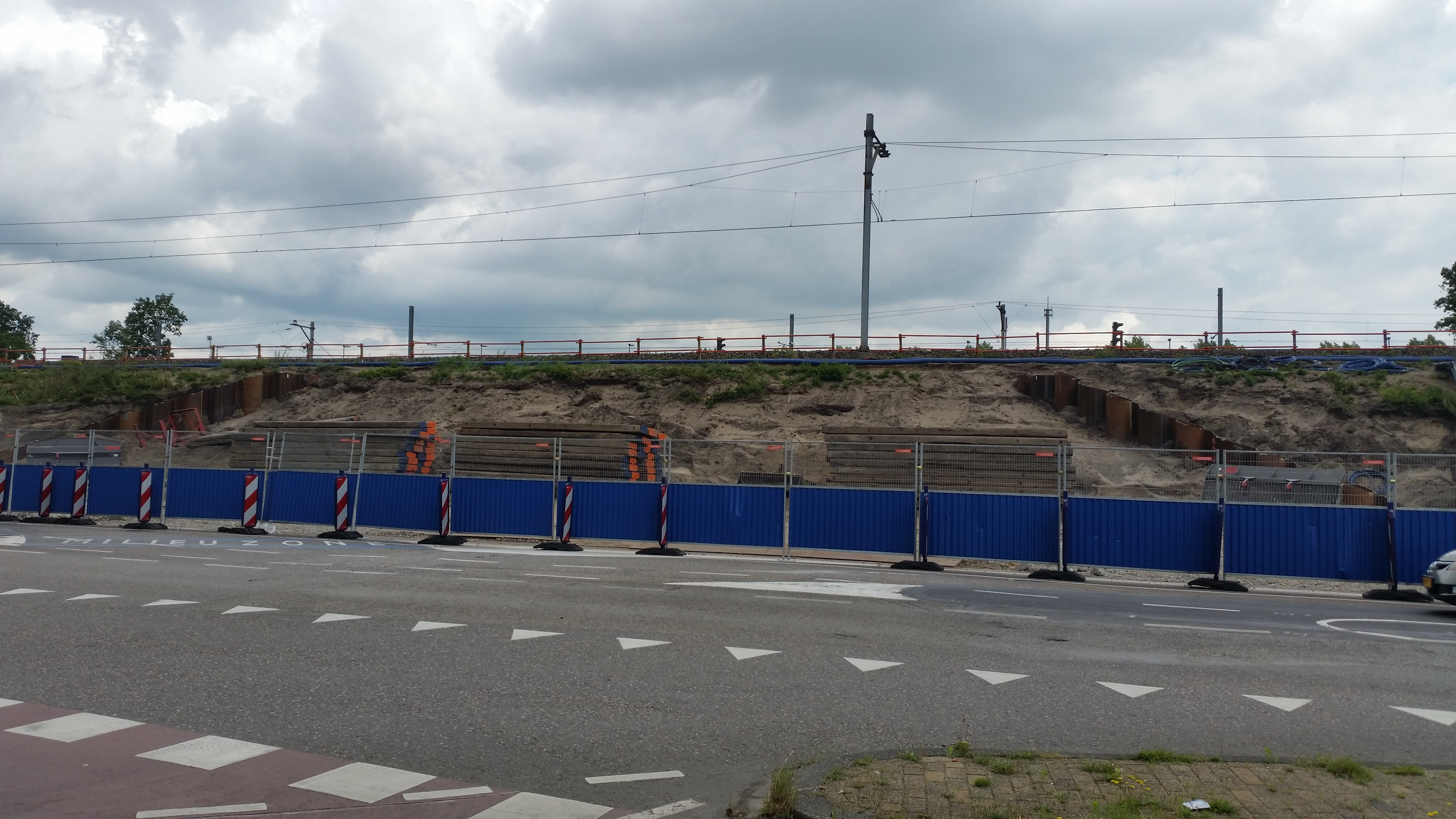 Onderdoorgang Amstelstroomlaan, Amsterdam-Oost bij het afgraven; damwandplaten zijn geplaatst (juli 2020)